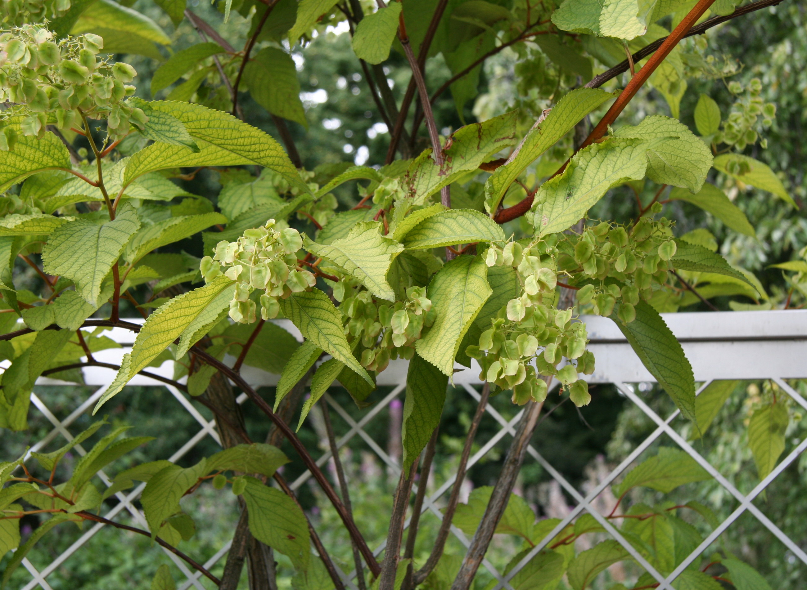 Tripterygium regelii im Botanischen Garten Kopenhagen